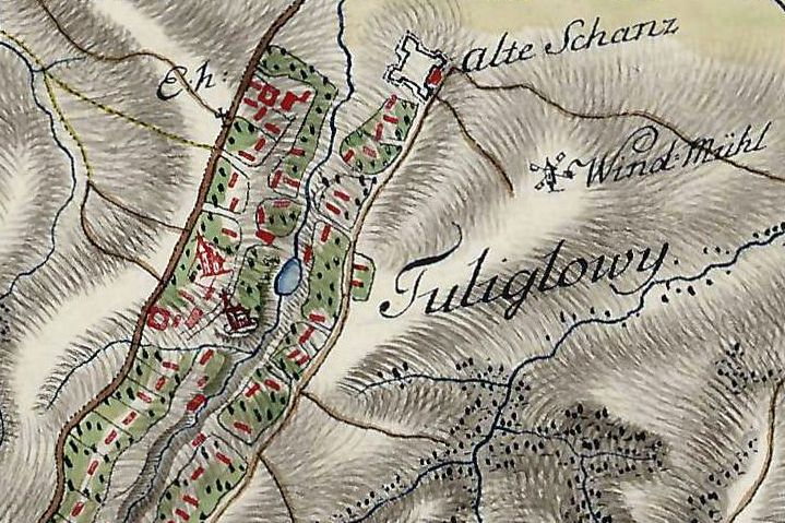 1. Militärische Aufnahme (-1772)